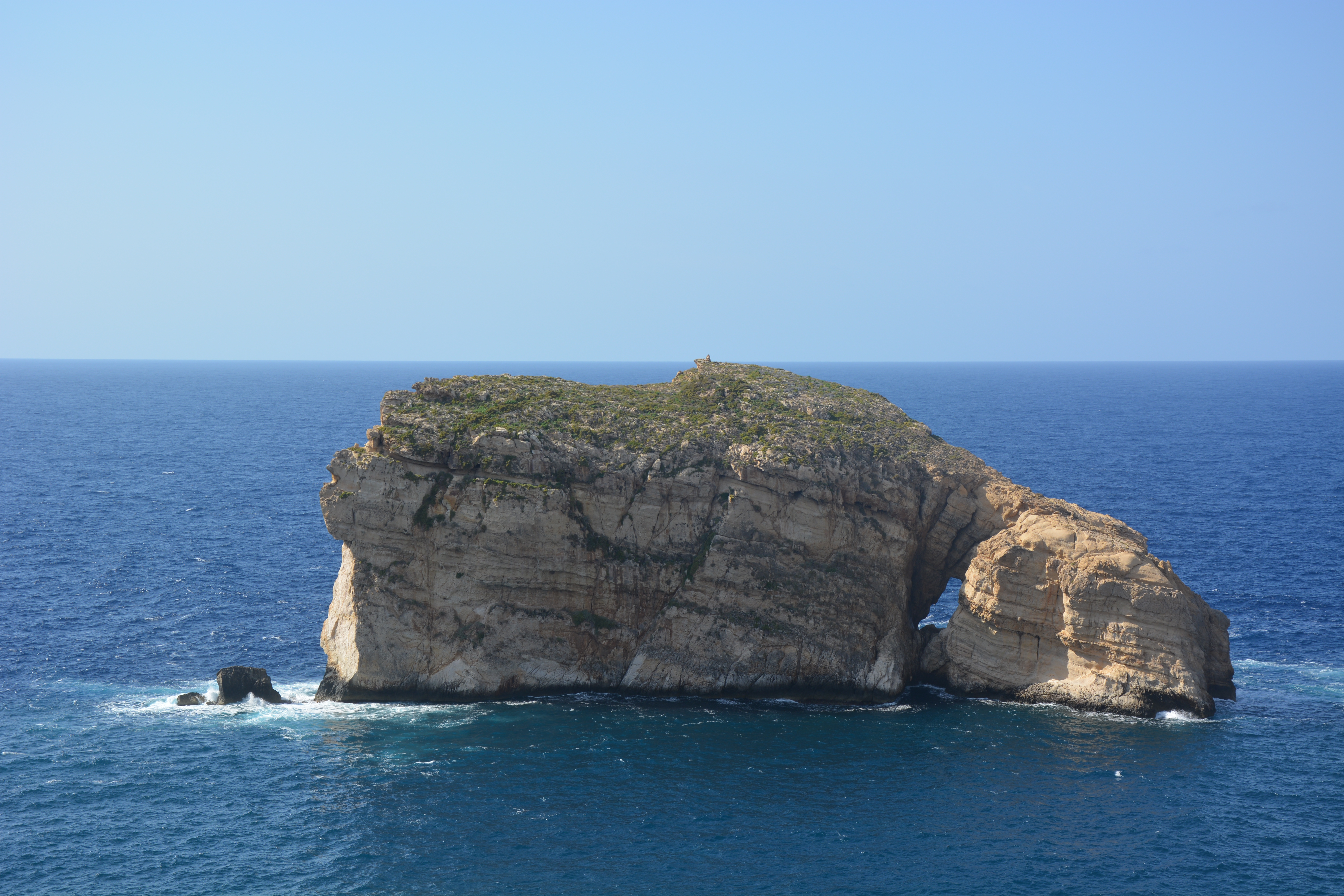 "Fungus Rock" à Dwejra, Gozo, Malte en octobre 2017